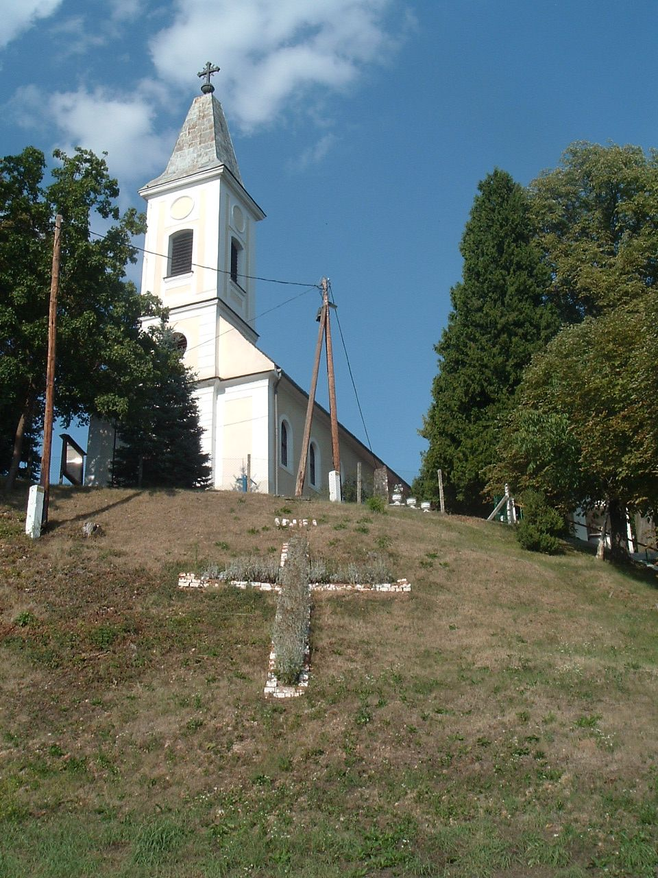 The Roman Catholic Church in Vasszentmihály. Szent Mihály római katolikus templom